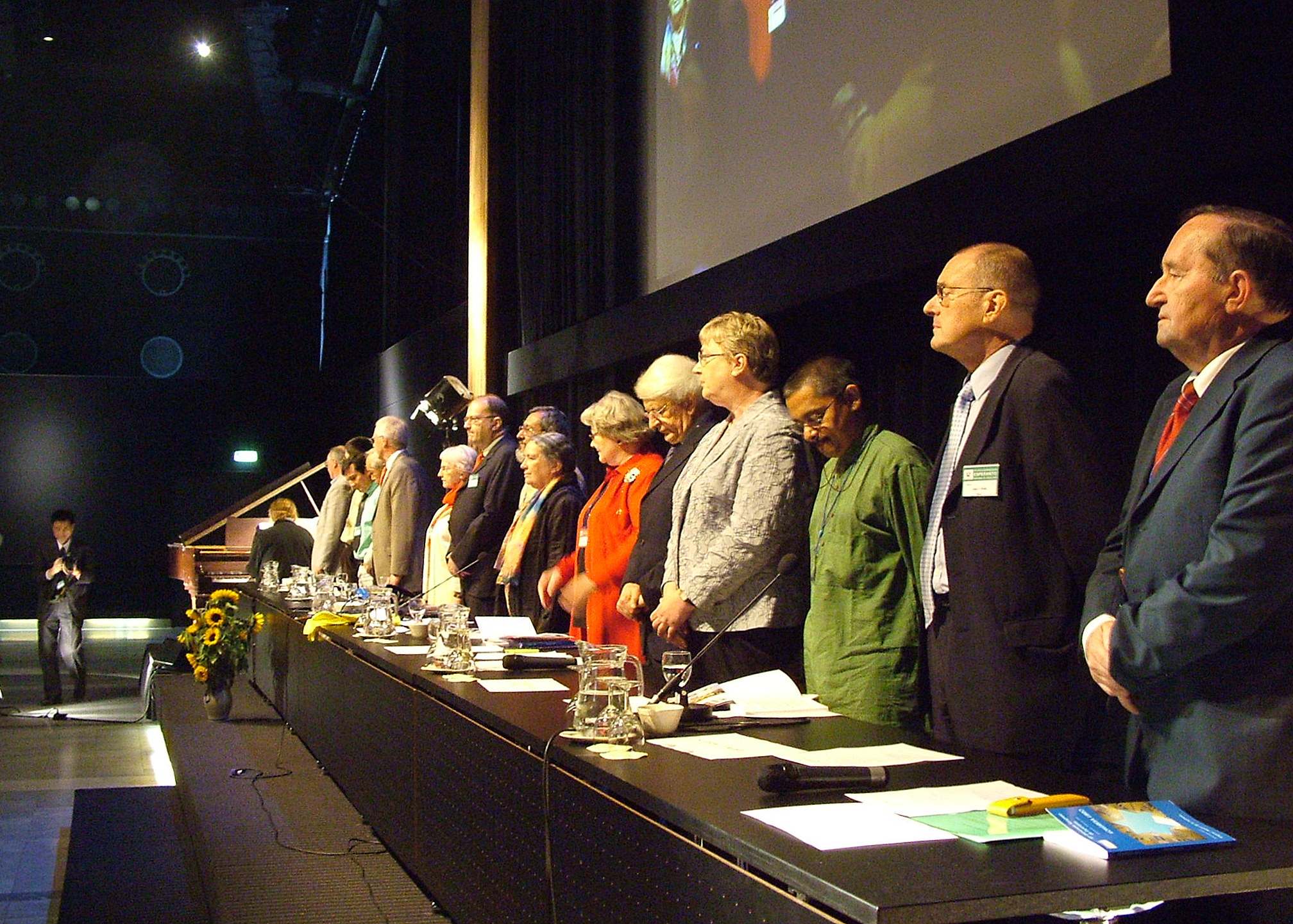 Universala Kongreso de Esperanto, Roterdamo 2008. Inauxguro.